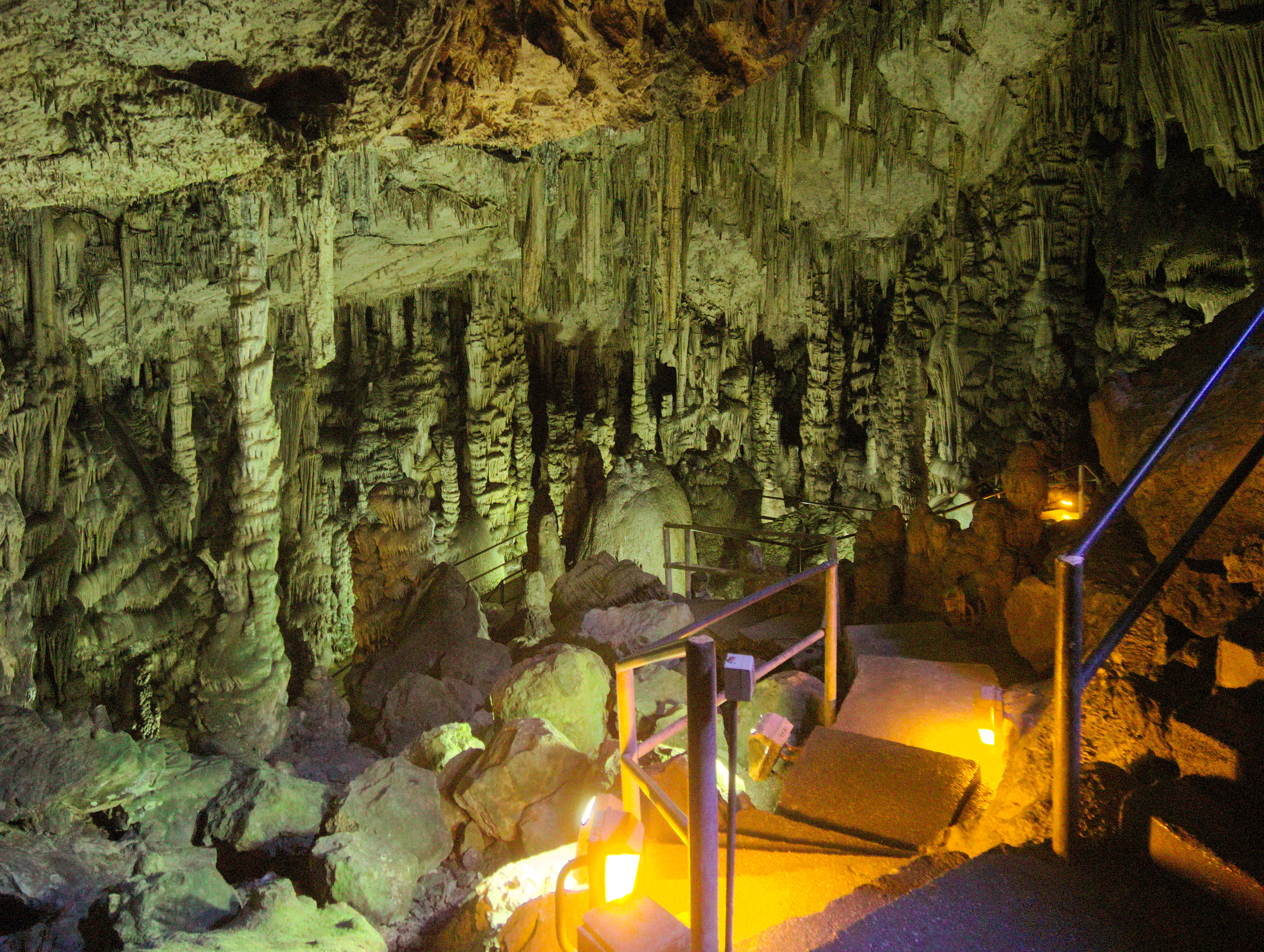 Κάθοδος προς το κατώτερο τμήμα του Δικταίου Άντρου. This is a photography of Natura 2000 protected area with ID GR4320002